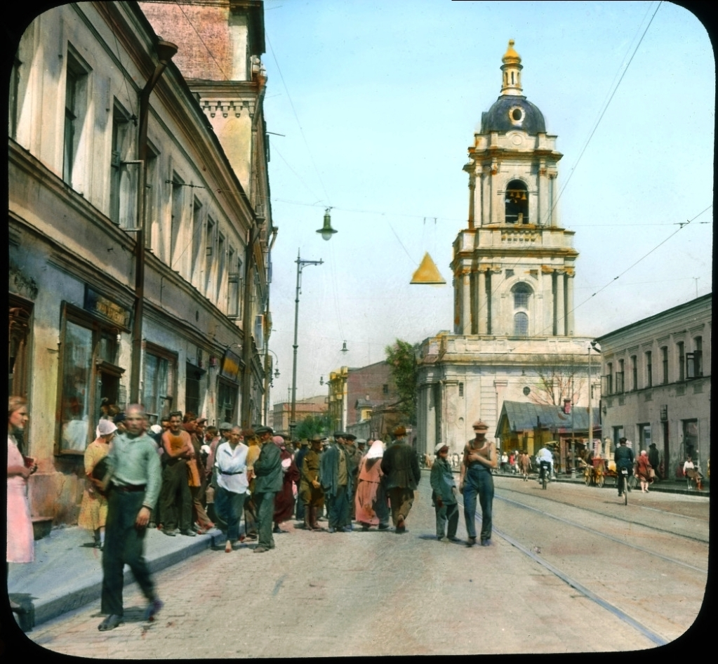 Москва. Пятницкая улица у церкви Параскевы Пятницы. // Слева на переднем плане существующий дом 24 по Пятницкой, за ним 22 и (высокий брандмауэр) 20.